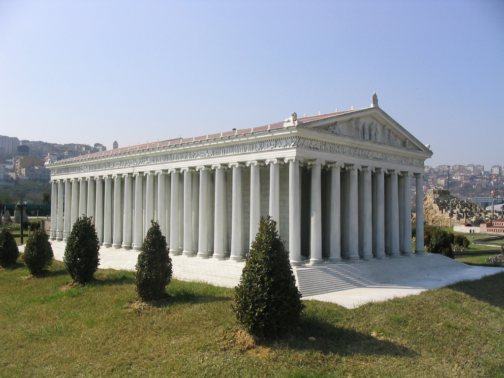 Pravděpodobná podoba Artemidina chrámu v Efesu, Miniatürk Park, Istanbul, Turecko.